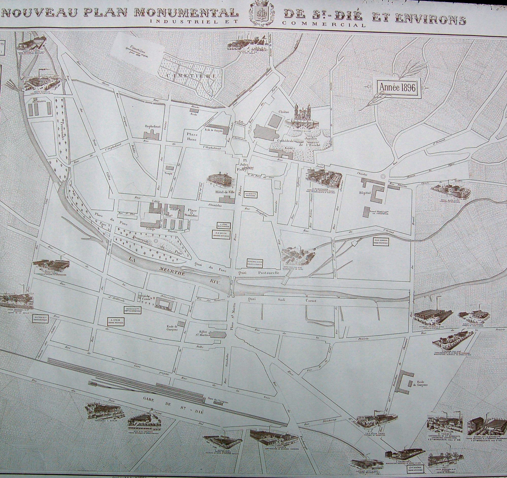 Plan de la ville de Saint-Dié (Vosges) en 1896. Le plan monumental entier comporte des vignettes publicitaires représentant de manière idéale les entreprises ou maisons commerciales sur les côtés et le bas. La topographie représentée par ce plan de ville à vocation publicitaire est schématique.